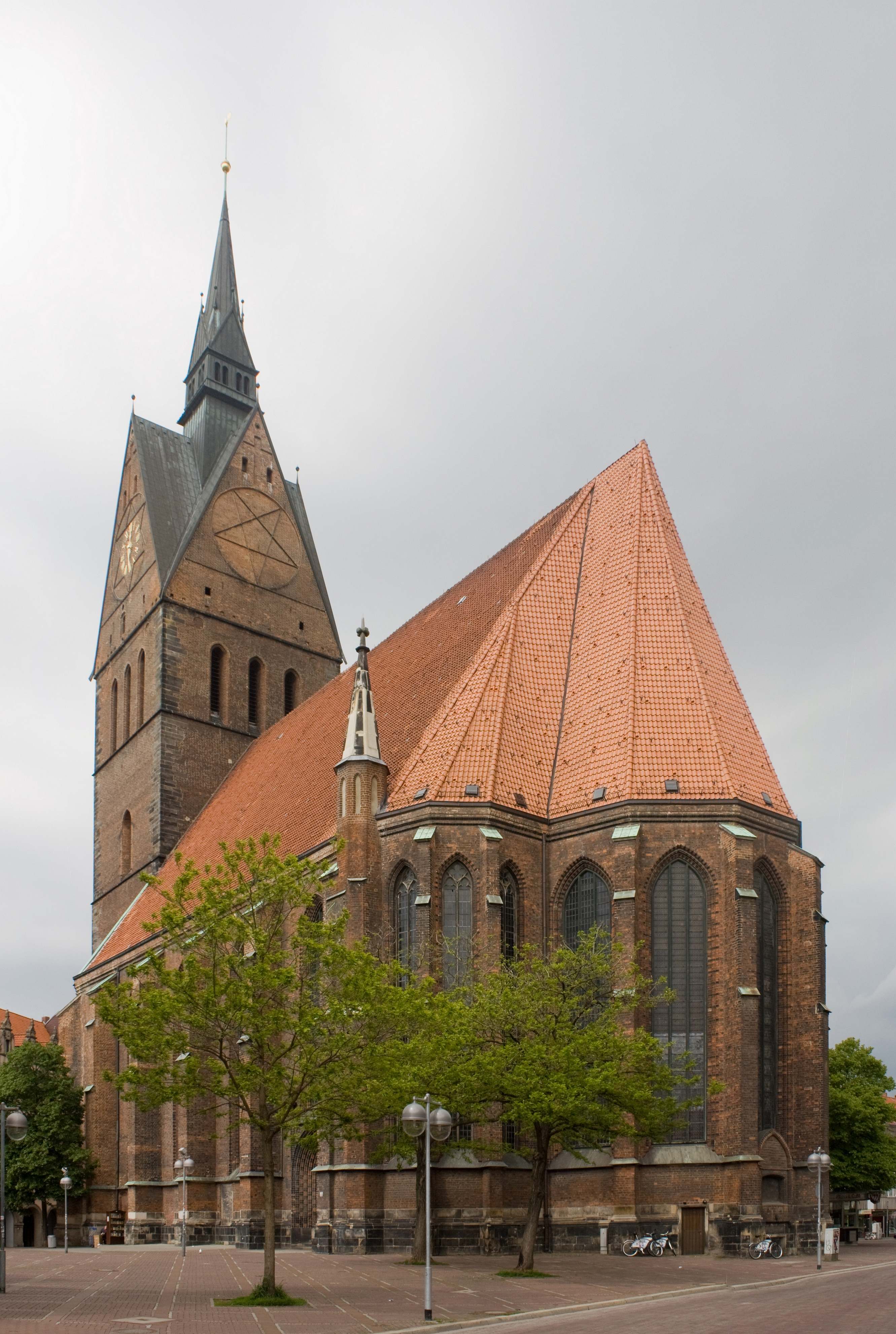 Marktkirche, Am Markte , Hannover